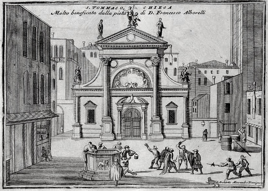 Veduta della chiesa di San Tomà, Venezia, da Vincenzo Coronelli, Singolarità di Venezia e del serenissimo suo dominio, 1709, tavola 126 della copia dell'Accademia Cosmografica degli Argonauti